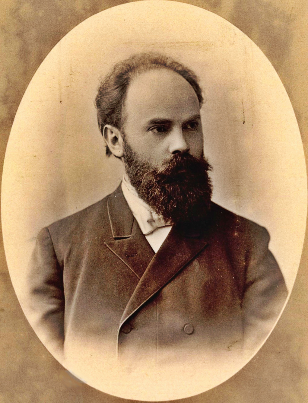 תצלום דיוקנו של הסופר יהודה לייב (ליאון) רבינוביץ' ("איש יהודי"): הדפס בגוני חום, בתבנית Cabinet card, בגודל 10.5X16.5 ס"מ. תצלום זה הופק על ידי הצלם והמשורר קונסטנטין אבא שפירא, בעיר סנט פטרבורג. בגב התצלום, נוספו חותמות המעידות כי פריט זה נתרם לבית הספרים הלאומי על ידי ד"ר יוסף חזנוביץ' בראשית המאה העשרים, וכן נוספה הערה בכתב ידו: "תמונת המו"ל והעורך של "המליץ", תרנ"ה. הר' לעאן ראבינאוויץ נ"י".